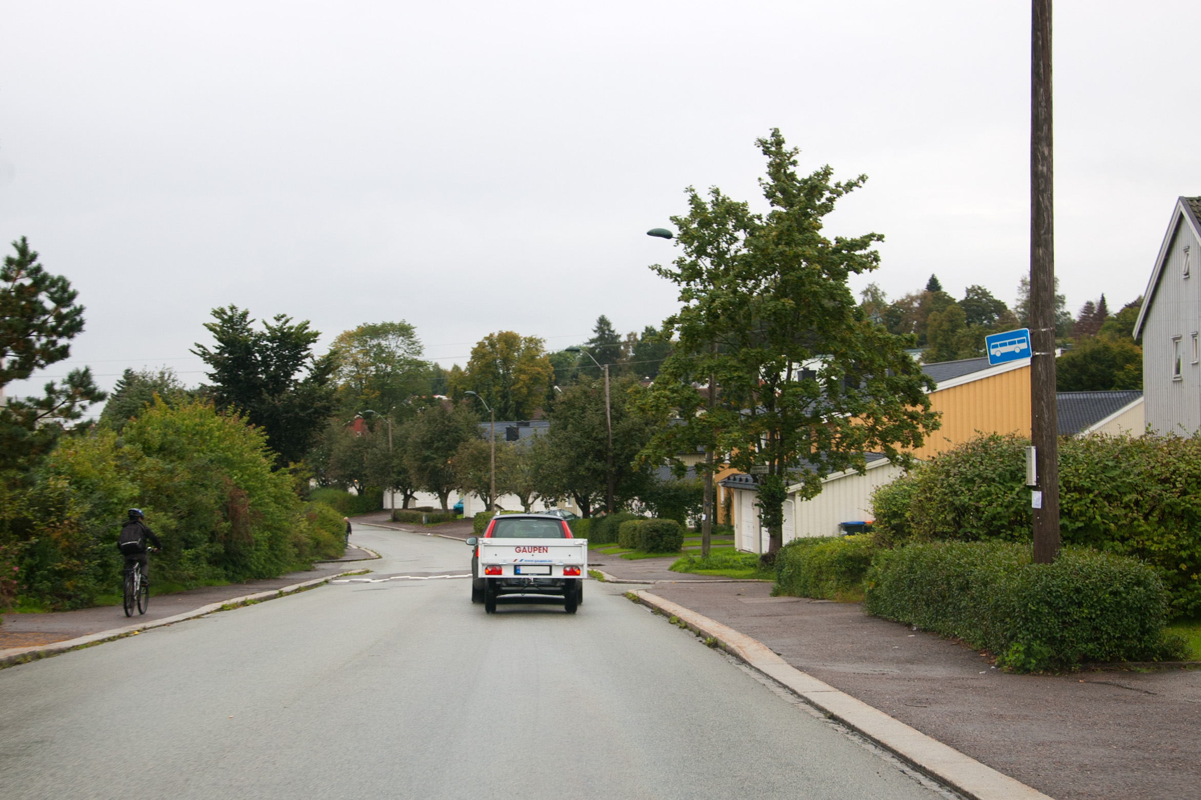 Fylkesvei 463 Severin Kjærs vei i Tønsberg, Vestfold